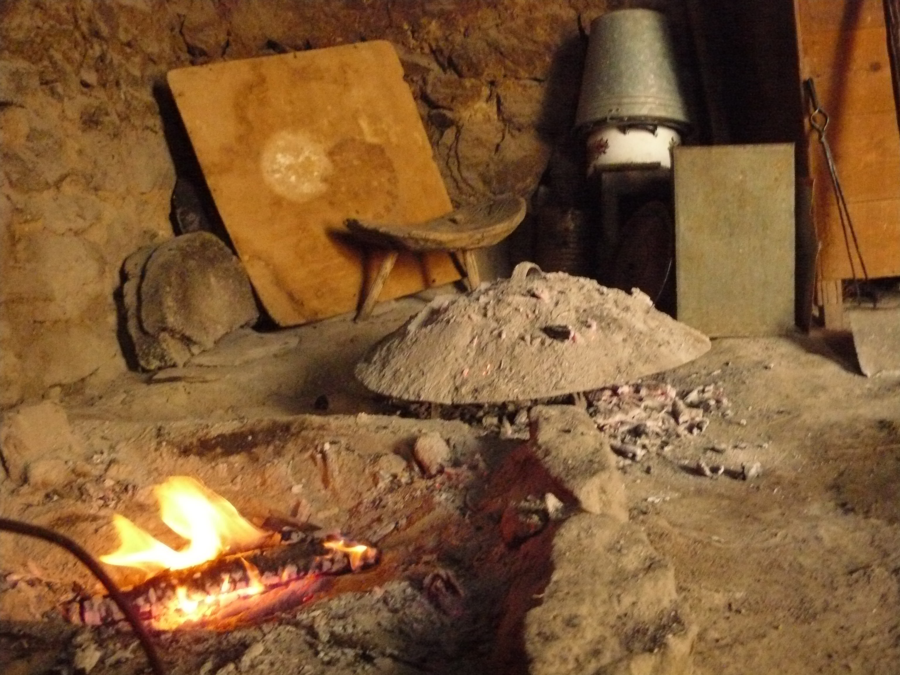 Внатрешност на куќа во с. Градец - подготовка на пита Зелник под Сач прекриен со жар